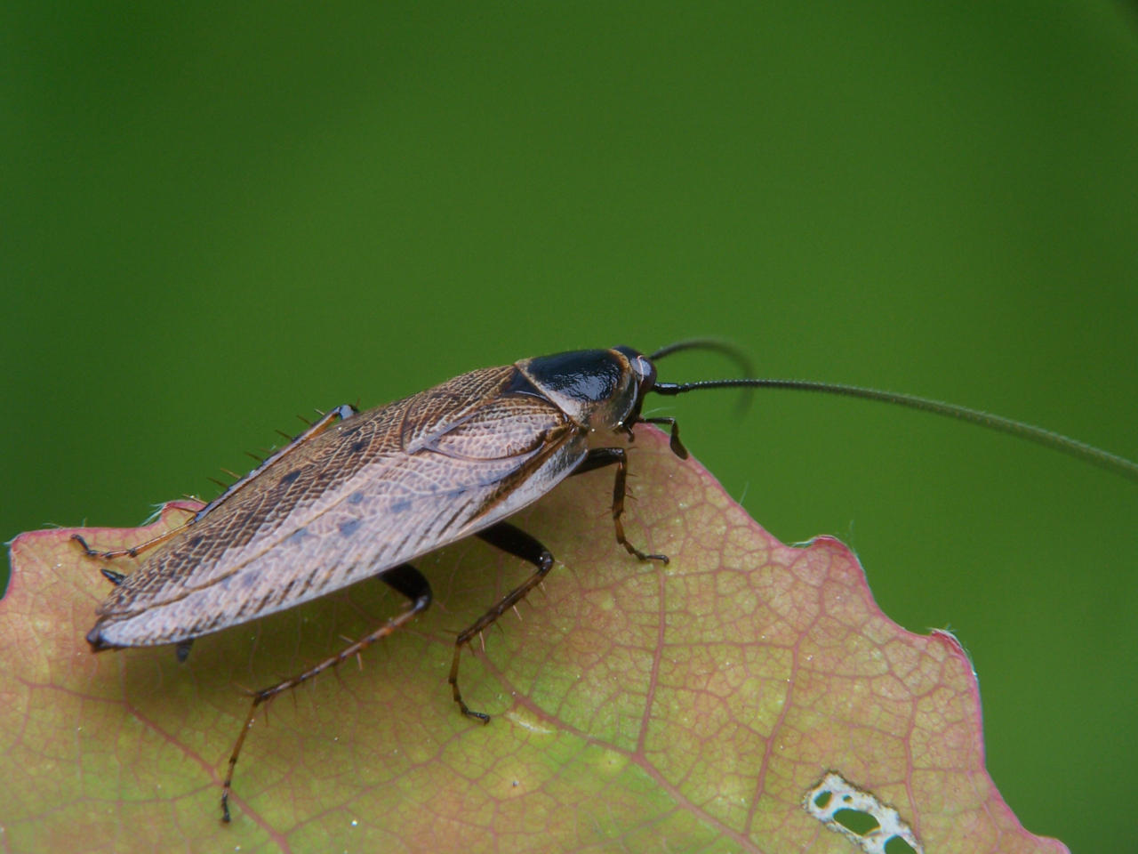 Ectobius lapponicus (male)